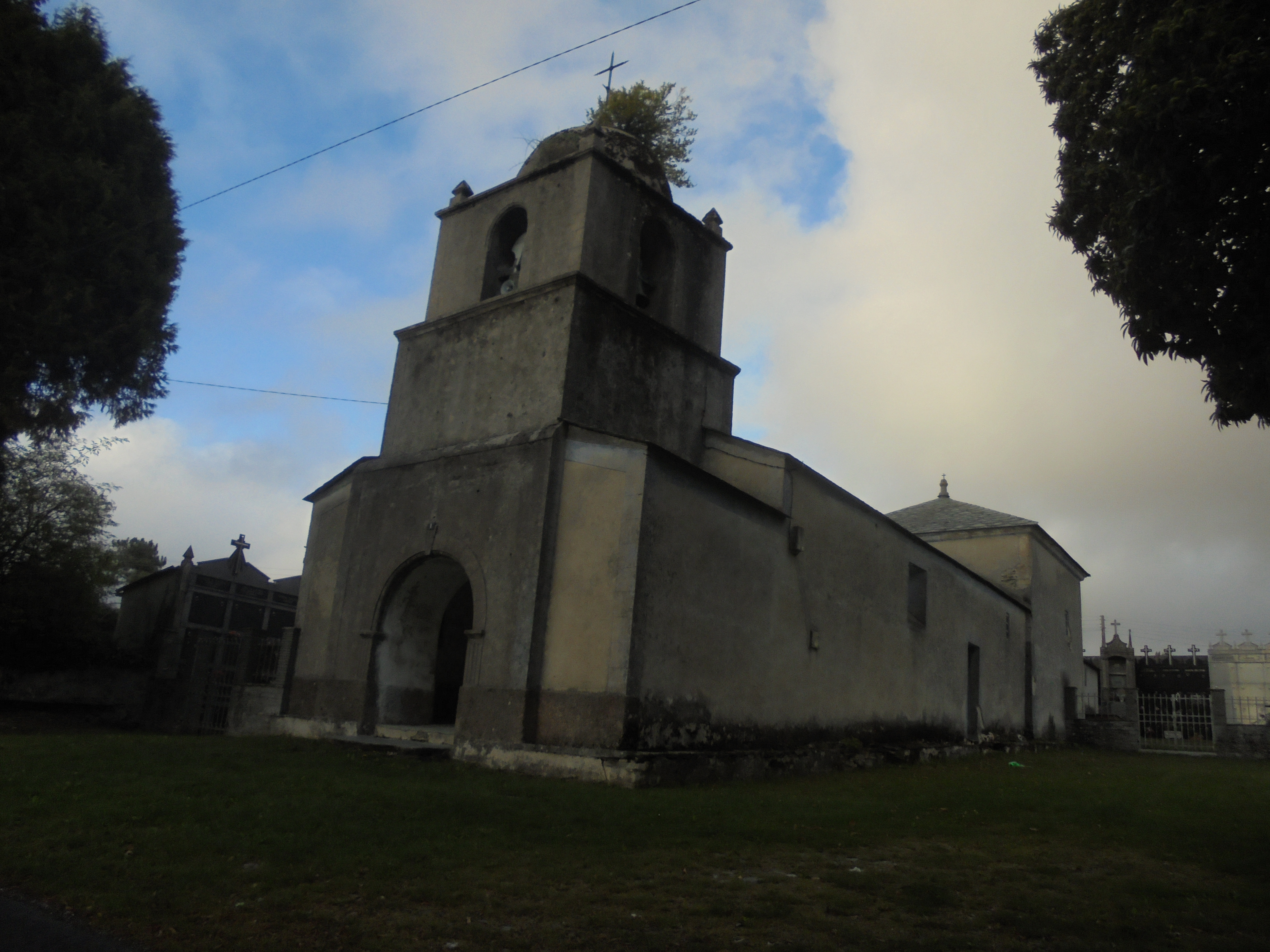 Igrexa parroquial de Hermunde (Pol)